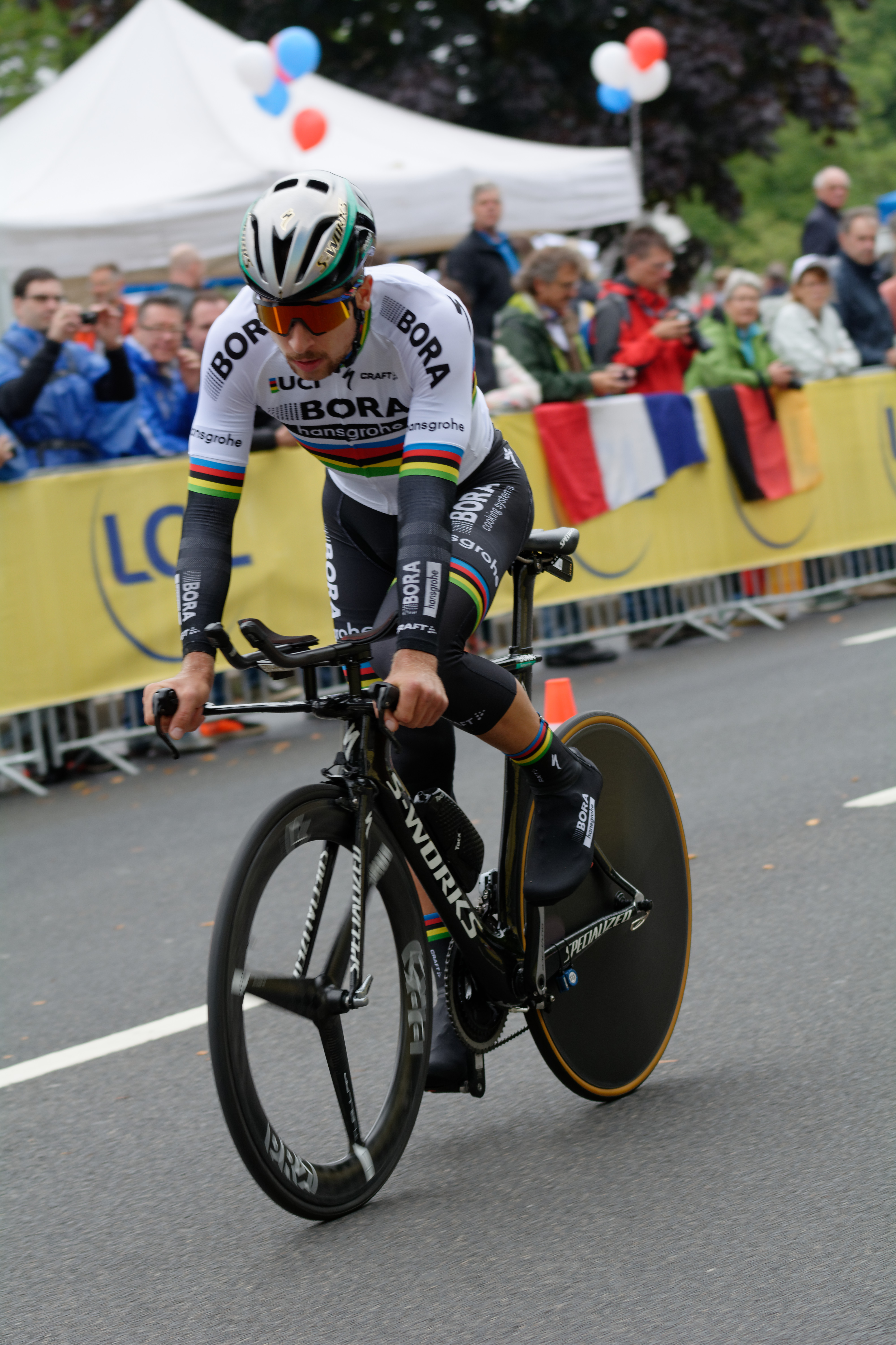 Tour de France 2017 Stage 1 Duesseldolf